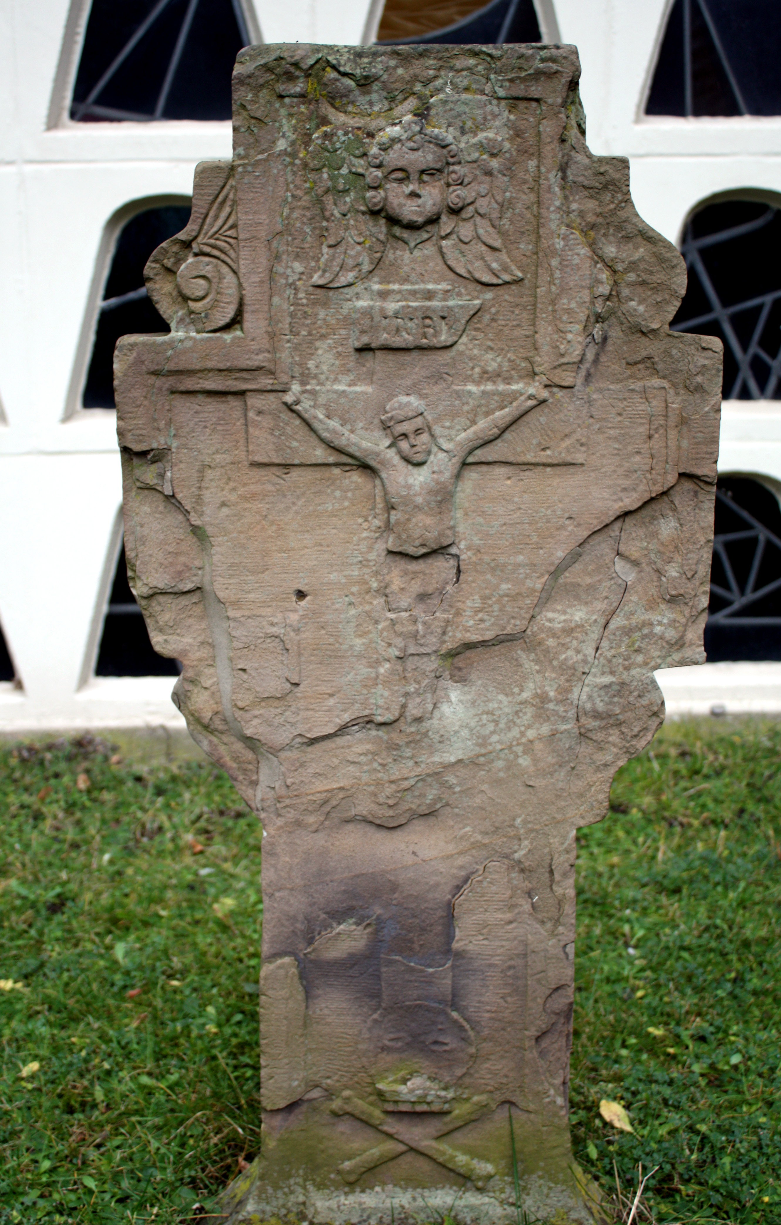 Hürth-Kendenich St. Johann Baptist. Grabkreuz des alten Kirchhofes